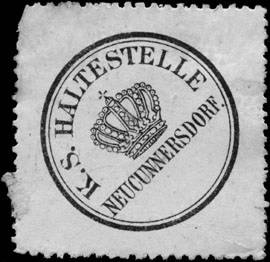 Sealing stamp Title: Königlich Sächsischer Haltestelle Neucunnersdorf Description: schwarz, weiß Place: Neucunnersdorf size: 4x4 cm